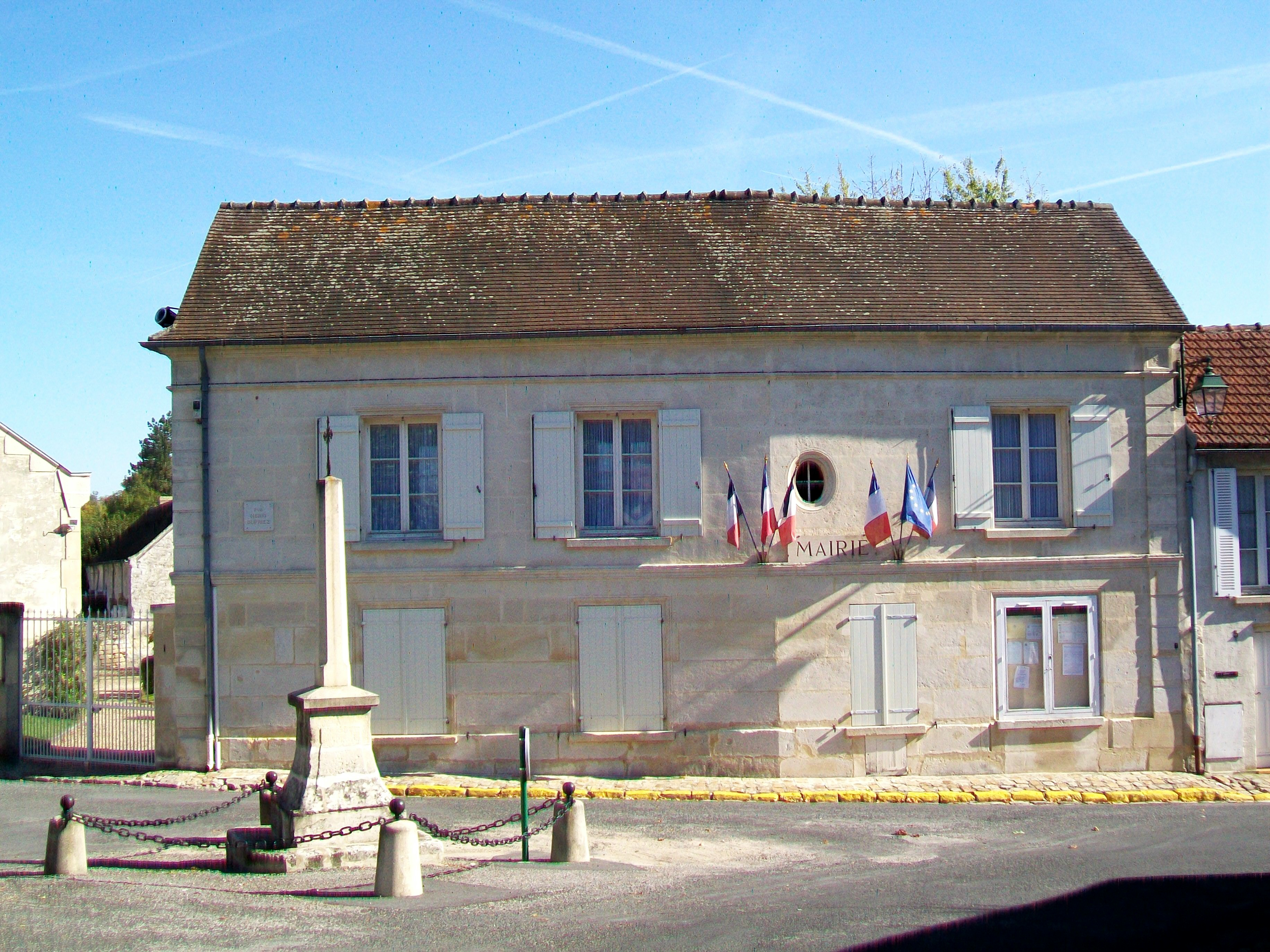 La mairie et la calvaire, 1 rue Henri-Dupriez, face à l'église. La mairie est établie dans cette même maison depuis 1874.